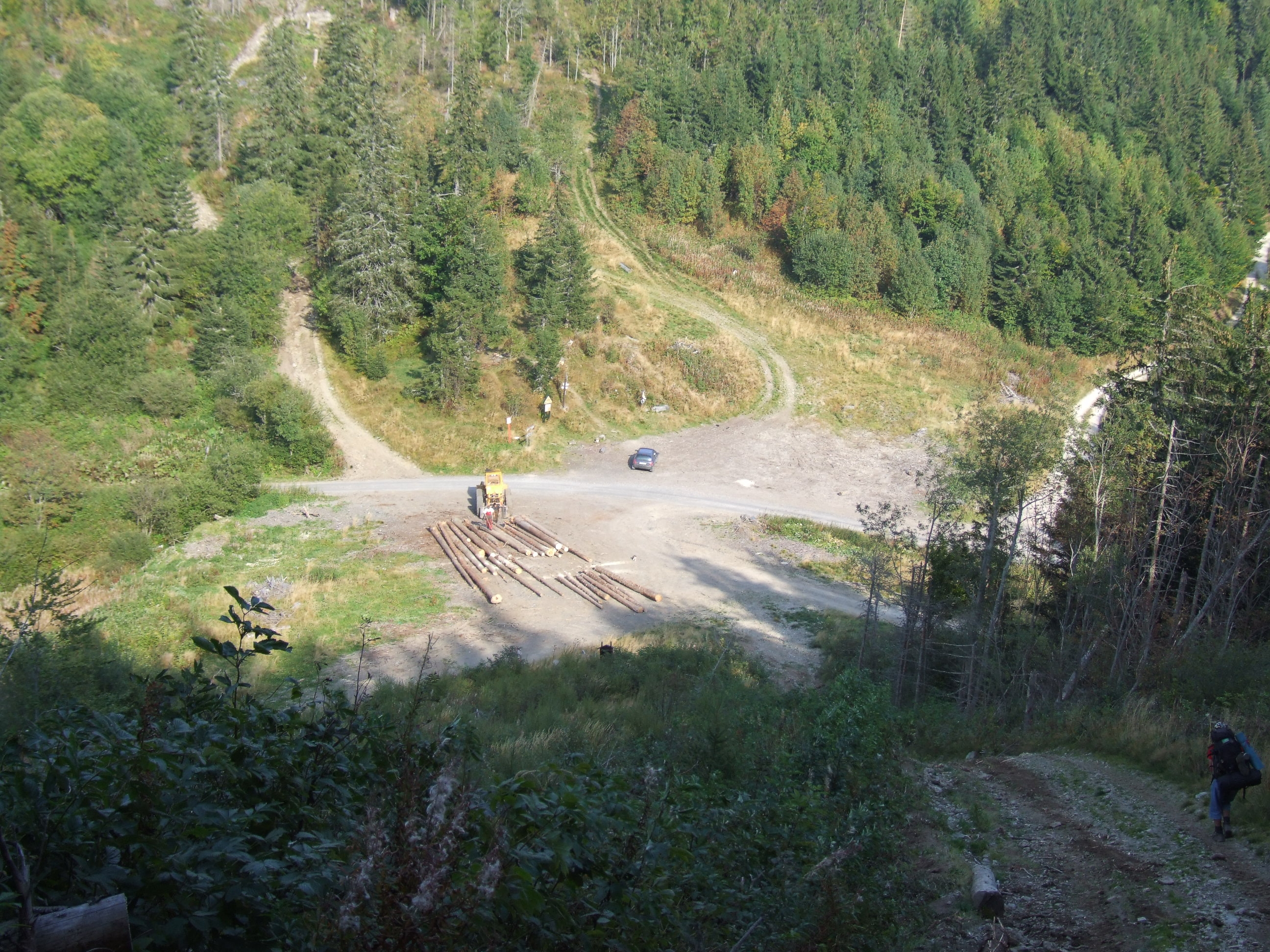 Sedlo Priehyba, Nízke Tatry